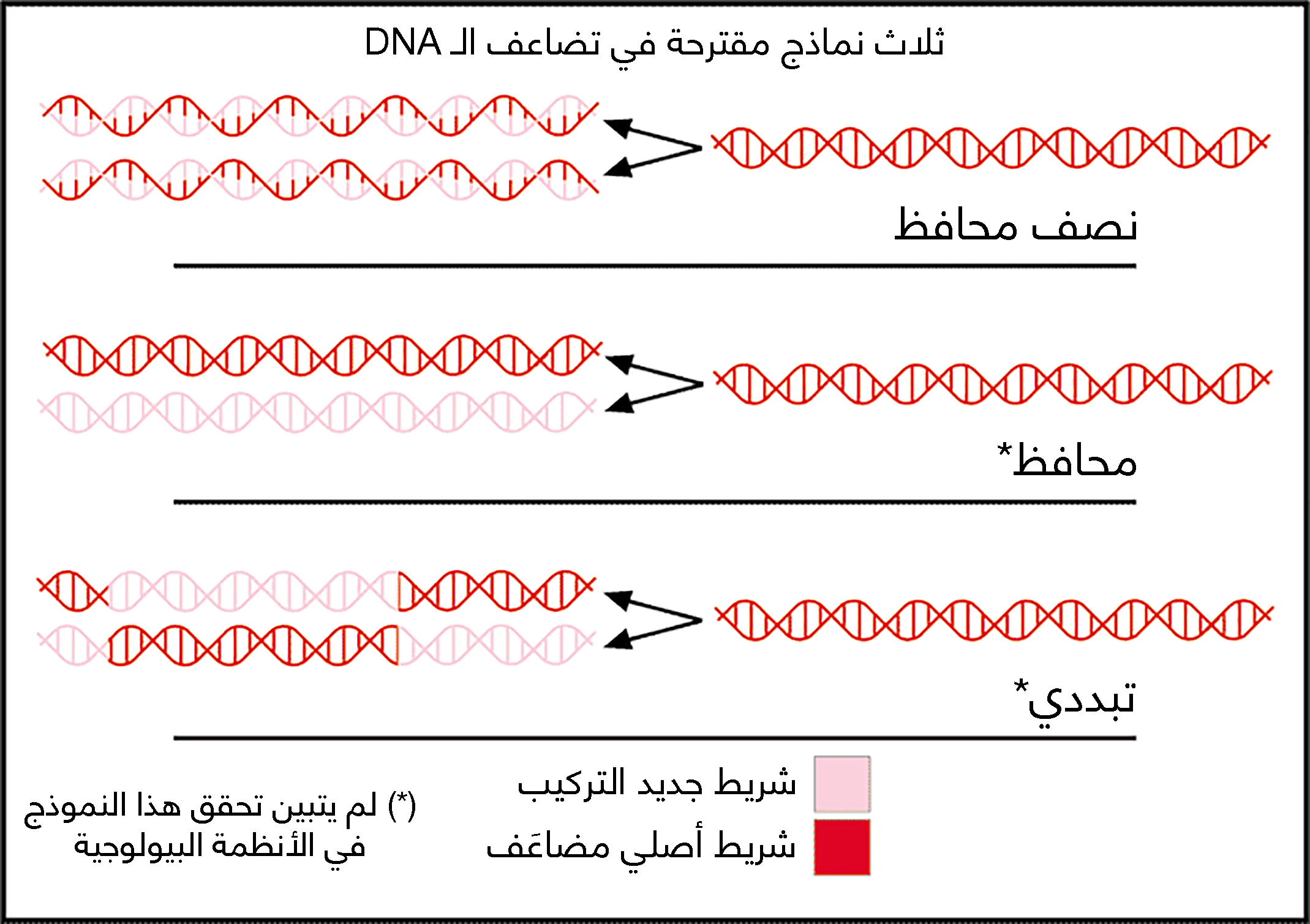 ملخص للفرضيات الثلاث المقترحة في آلية تضاعف الـ DNA عمل أصلي من أجل وكبيديا من طرف Mike Jones User: Adenosine